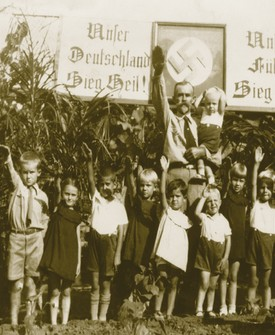 Crianças da Juventude Hitlerista fazem a saudação ao Führer. No cartaz se lê: "Unser Deutschland – Sieg Heil! Unser Führer – Sieg Heil!". Foto tirada em Presidente Bernardes, interior do estado de São Paulo, Brasil.